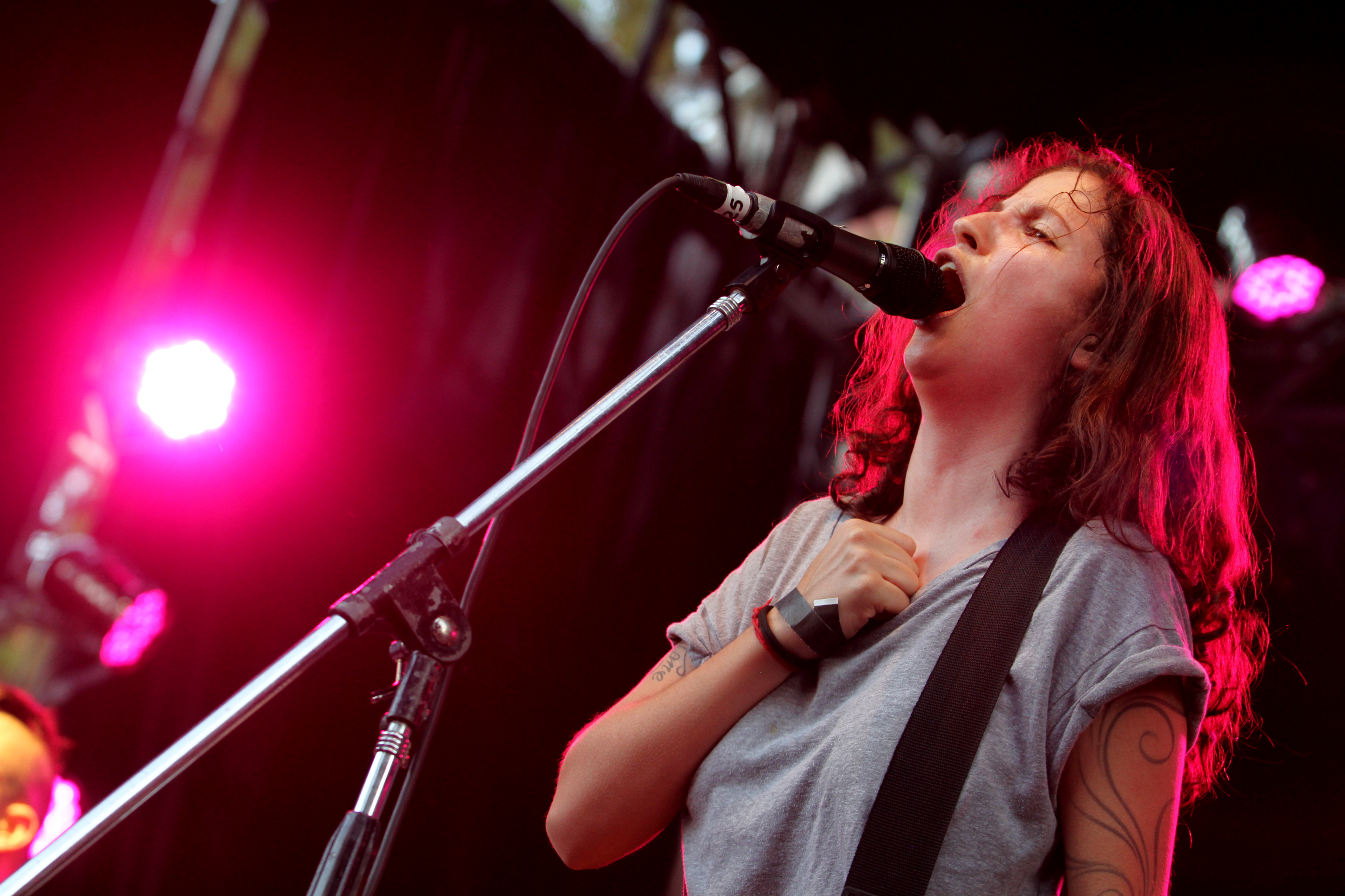 Bárbara Recanati, cantante y guitarrista de Utopians.